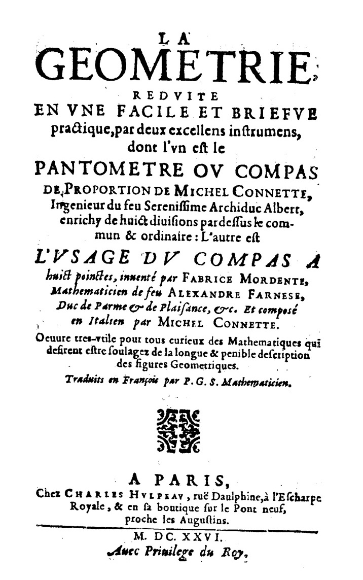 Frontespizio